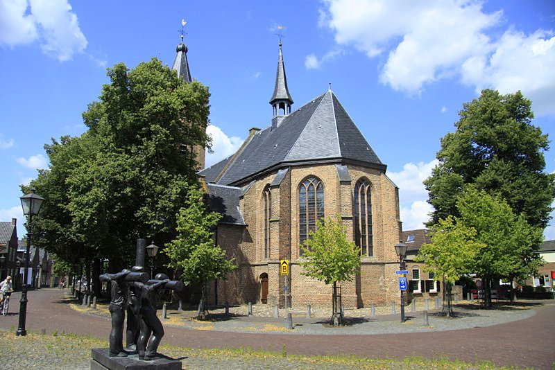 Een blik op de Hervormde kerk van Scherpenzeel in Gelderland.